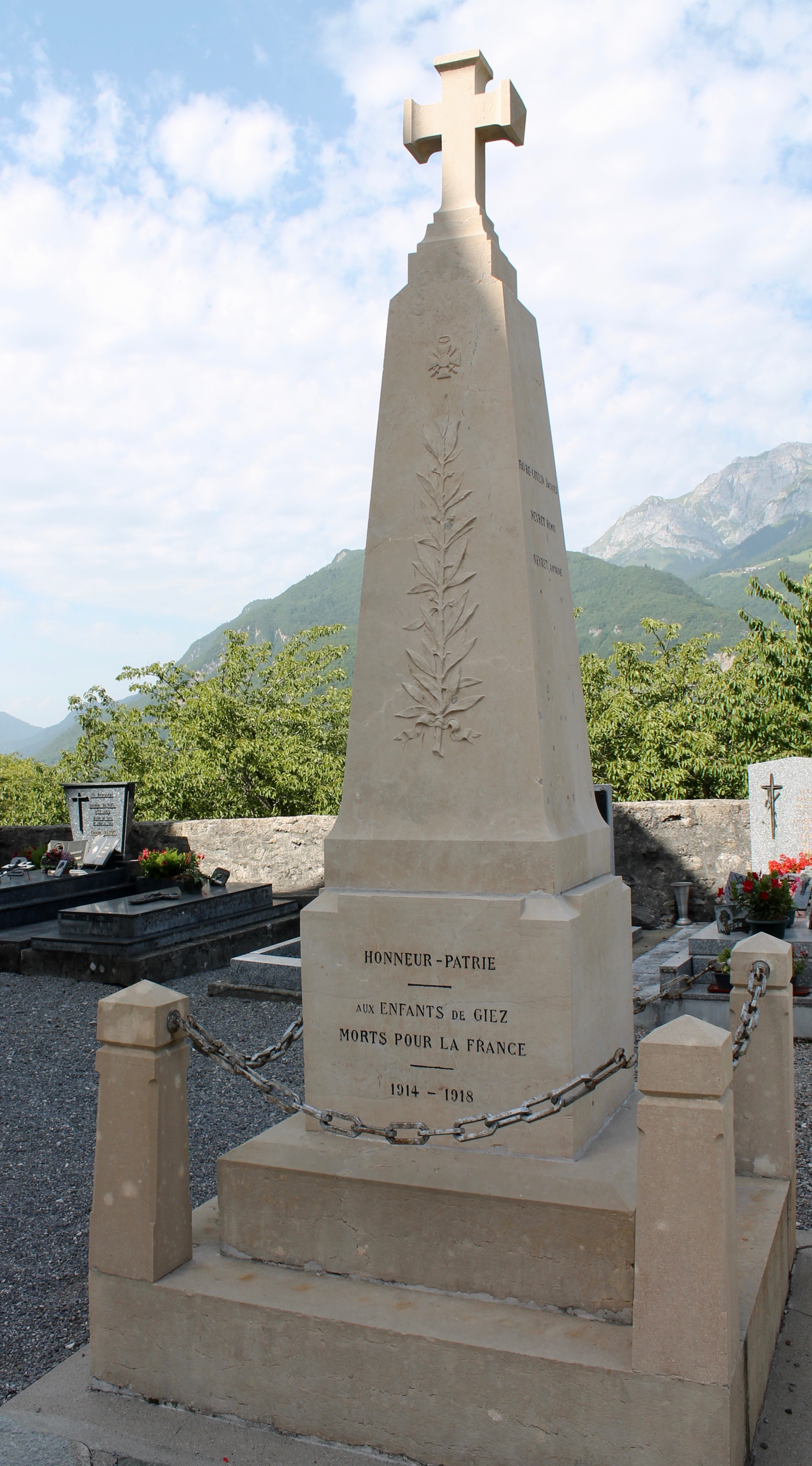 Monument aux Morts de la commune française de Giez (Haute-Savoie).